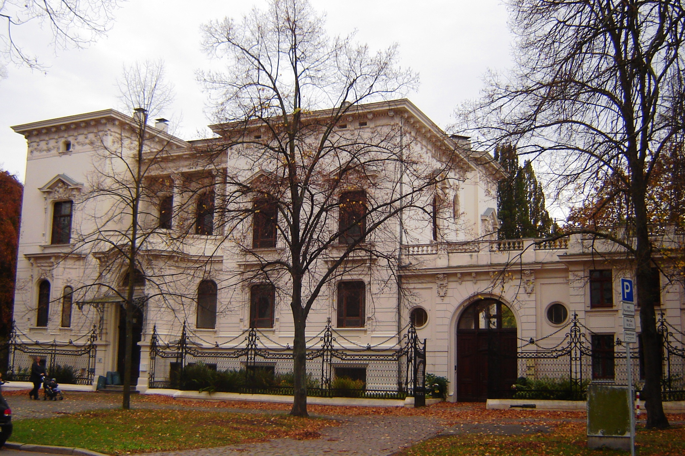 Magdeburg, Kaiser-Otto-Ring 3 (Kulturdenkmal)